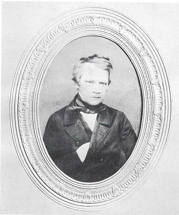 Fotografie von Karl August Jacob